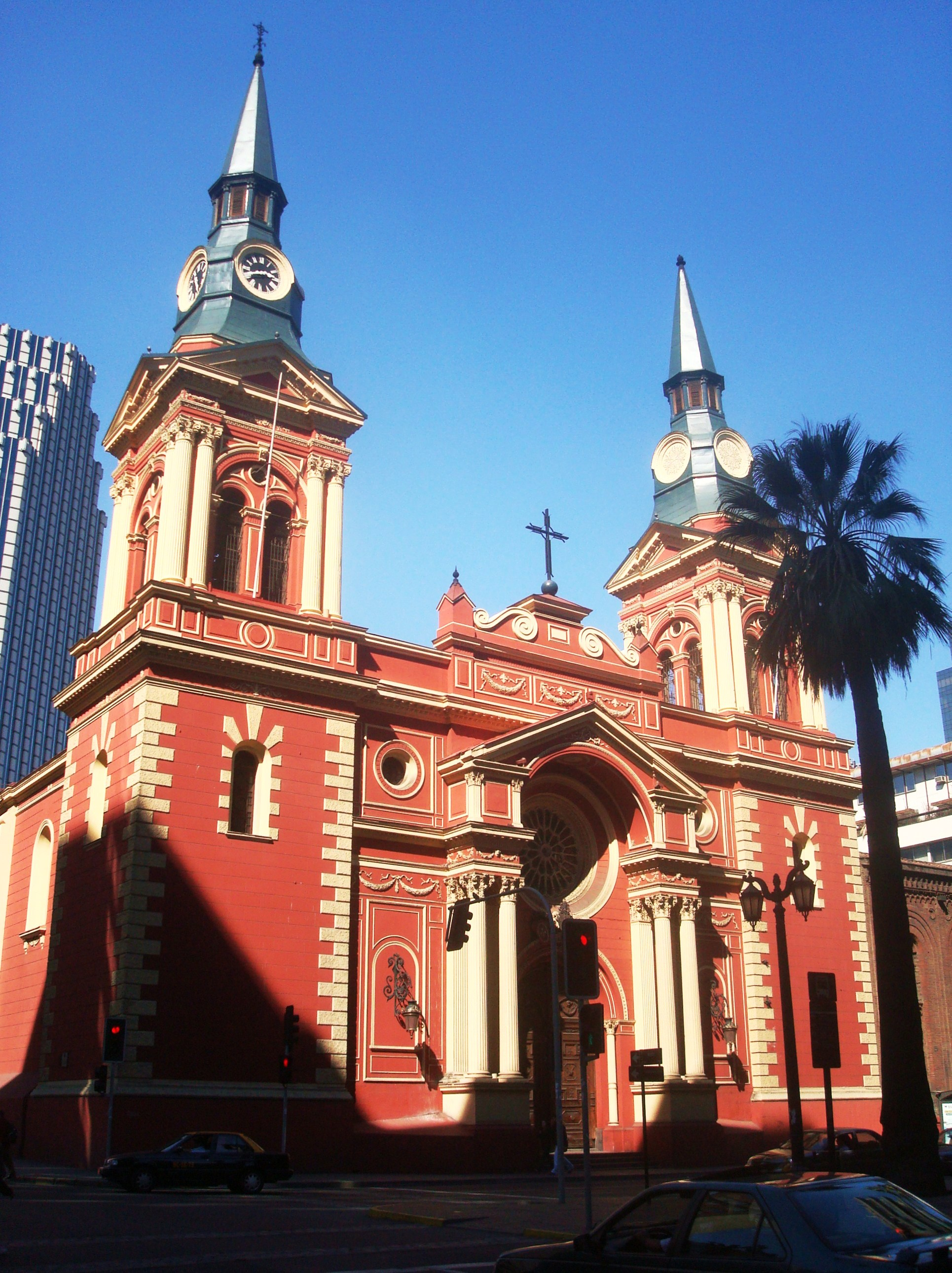 Basílica de La Merced, Santiago de Chile